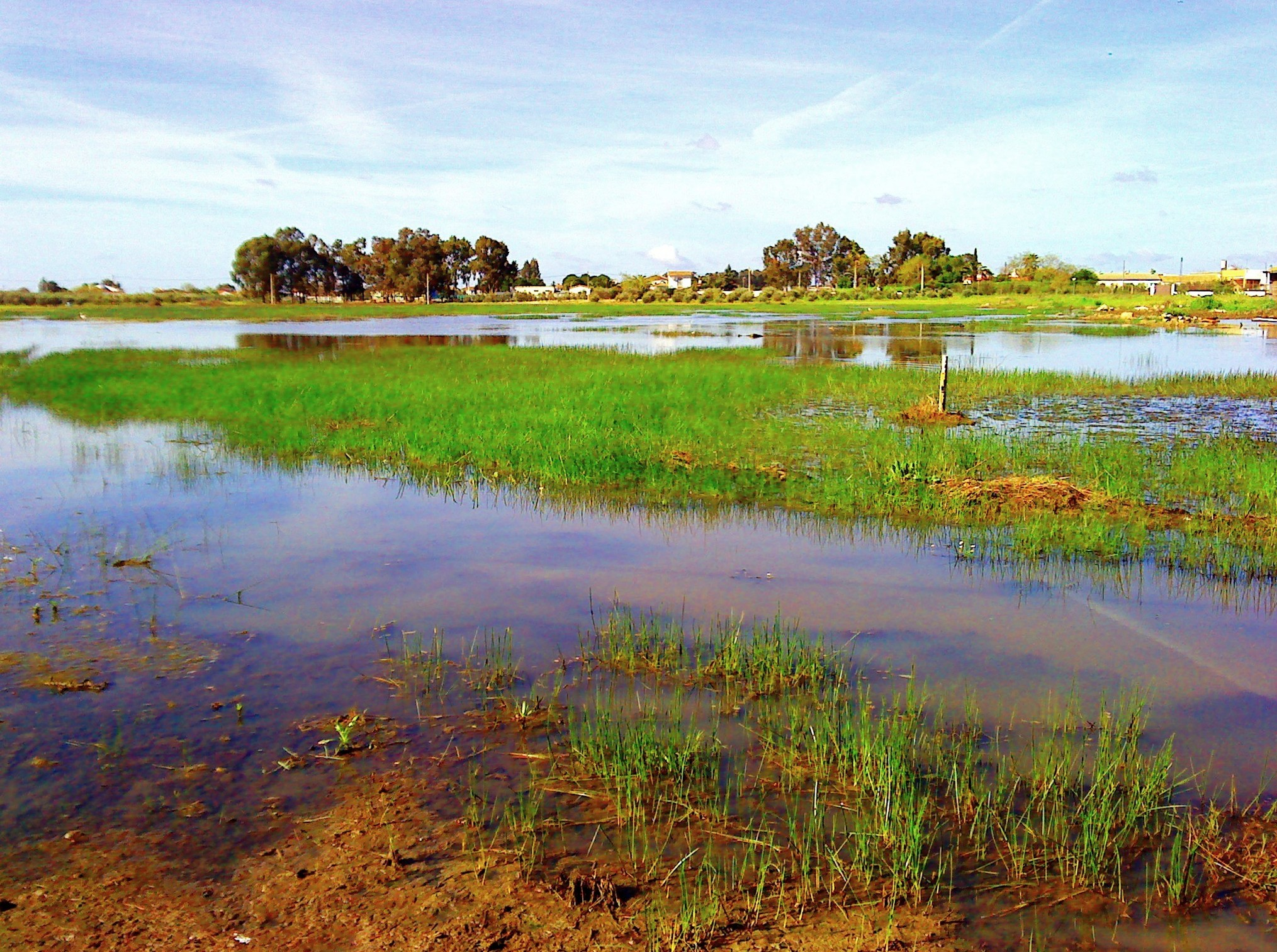 La laguna grande es una gran charca que se produce con la lluvias recogidas a lo largo del otoño-invierno, lugar muy conocido por los habitantes de El Arrecife